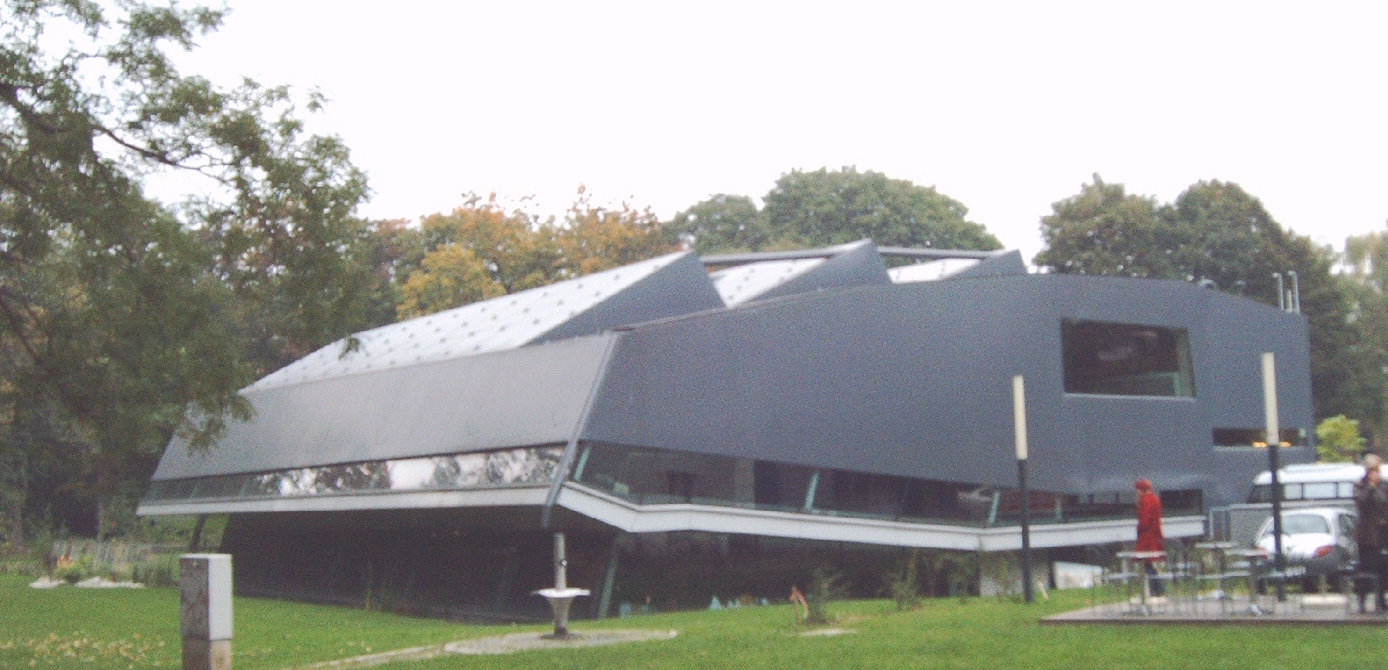 Frida und Fred - Kindermuseum in Graz Aufnahme: Oktober 2005 Url